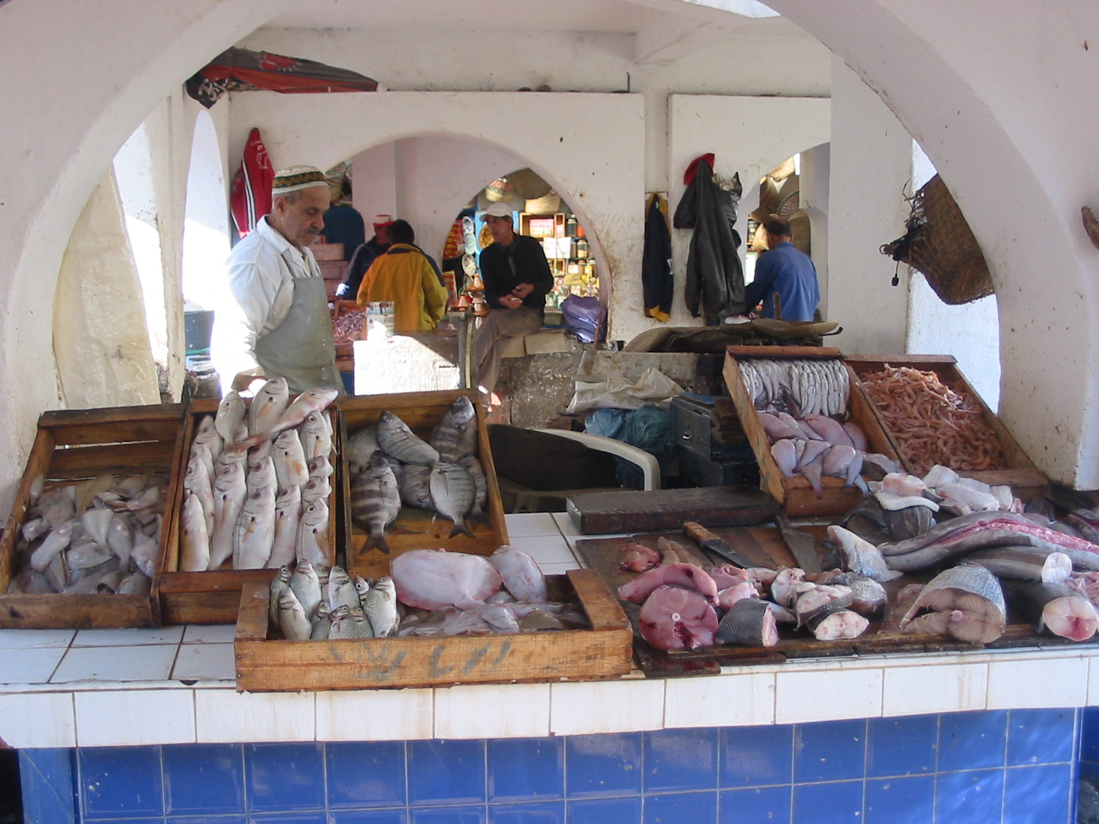 Essaouira,_Fish_Market